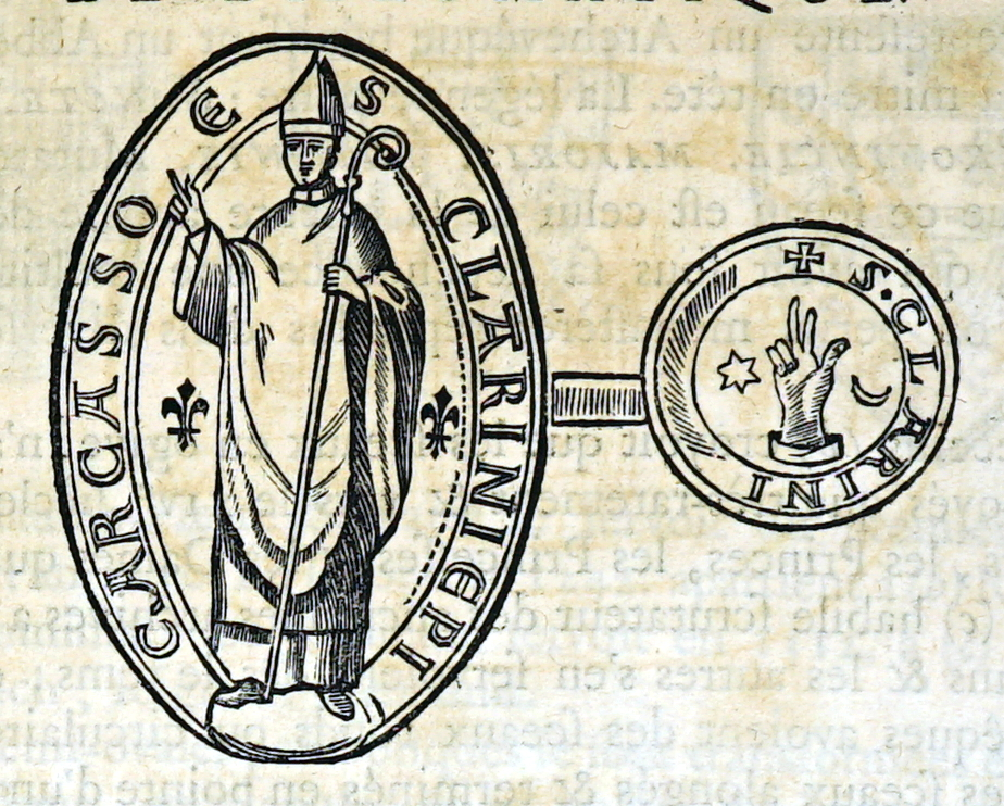 issu de "nouveau traité de diplomatique...".